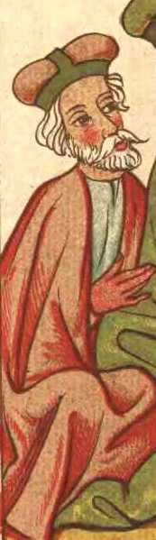 Bolesław II